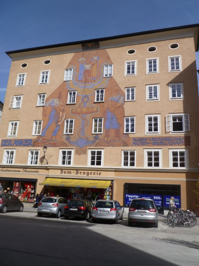 Wohn- und Geschäftshaus, Gerichtshaus oder Stadt-Trinkstube. Bildnis von Karl Reisenbichler aus dem Jahr 1928 für die Versicherung Der Anker.